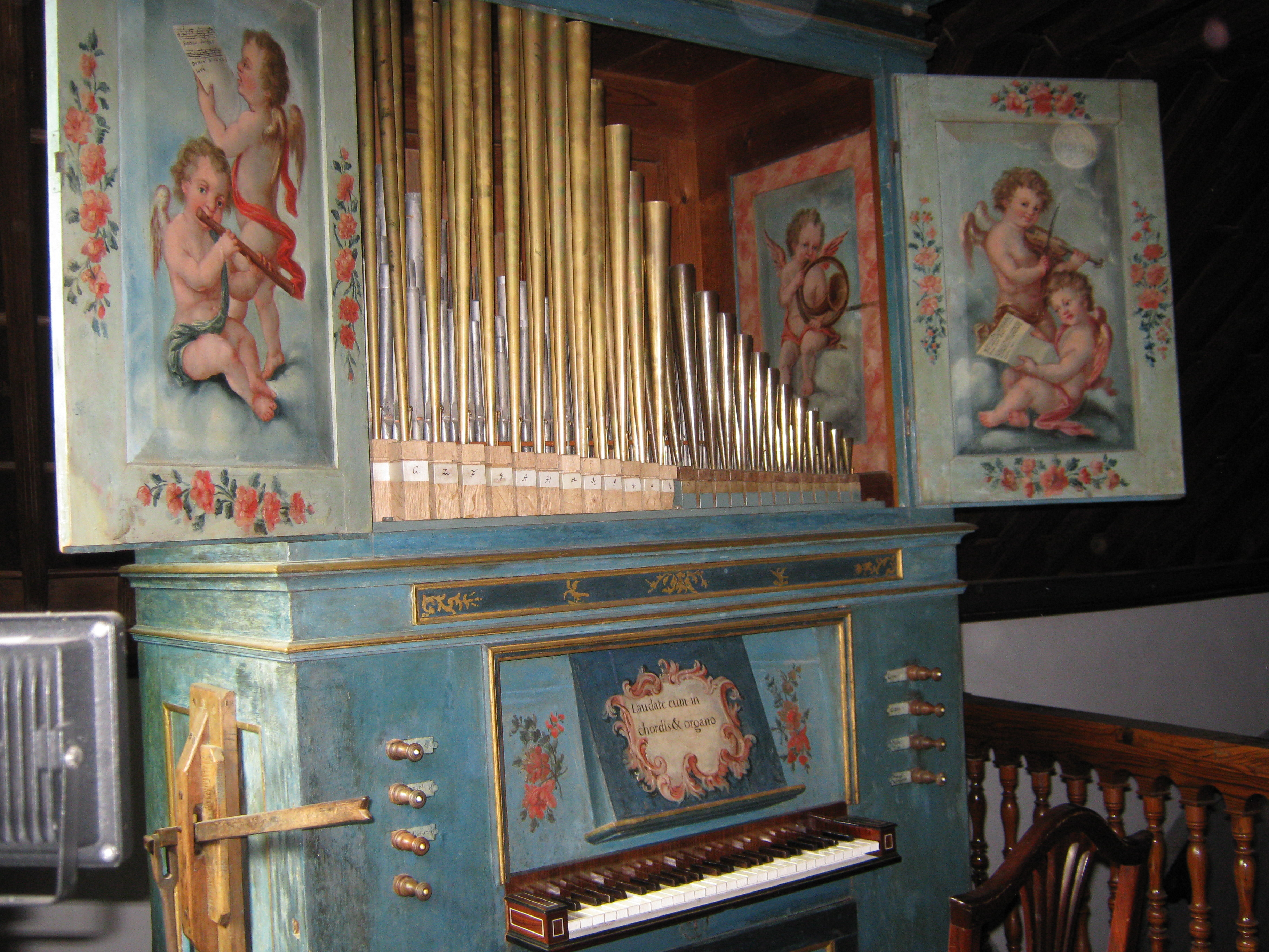 Iglesia Nuestra Señora de la Encarnación, La Victoria de Acentejo, Teneriffa, Kanarische Inseln, Spanien